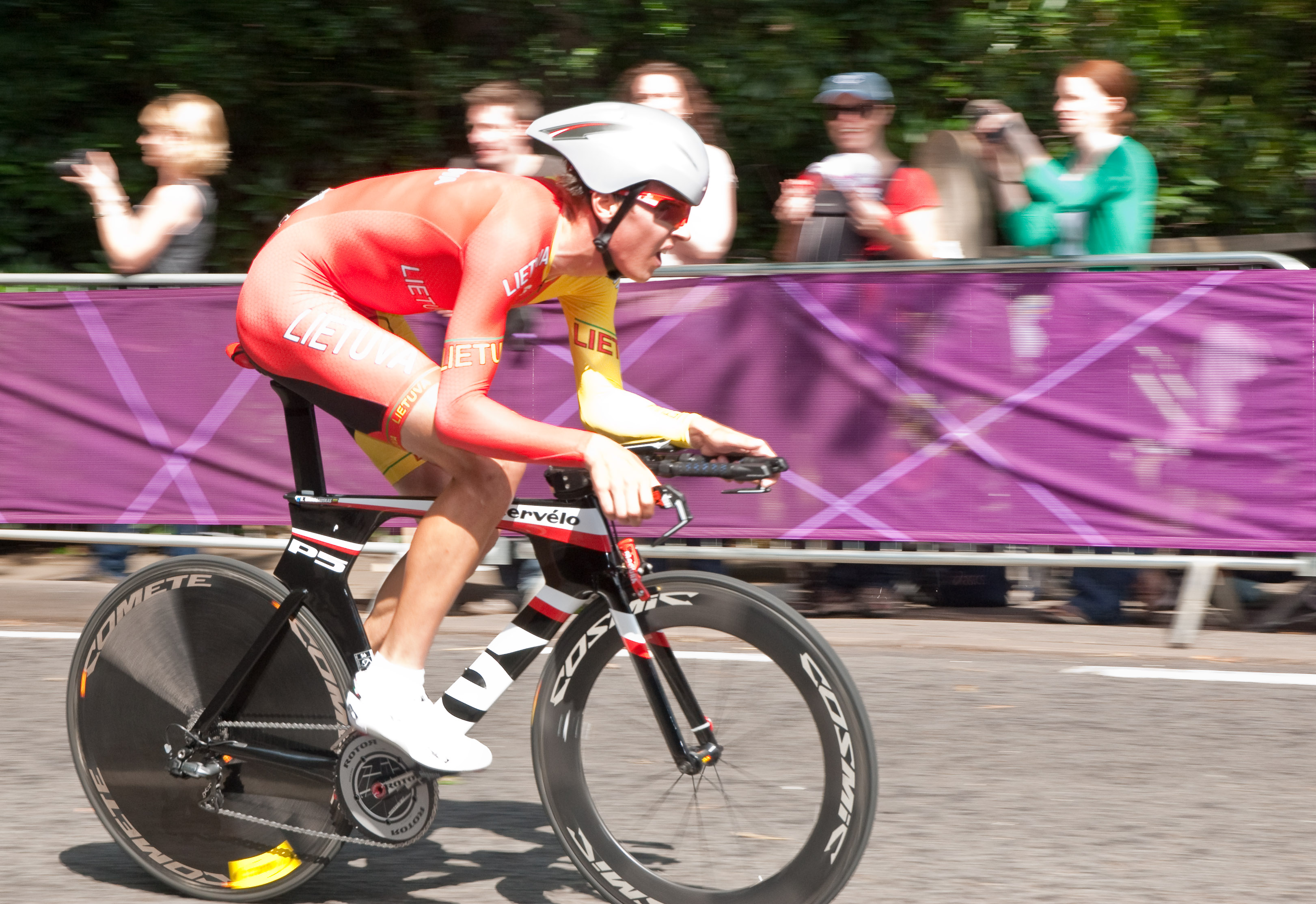 Ramūnas Navardauskas - Lithuania